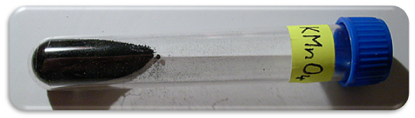 Manganistan draselný - KMnO4